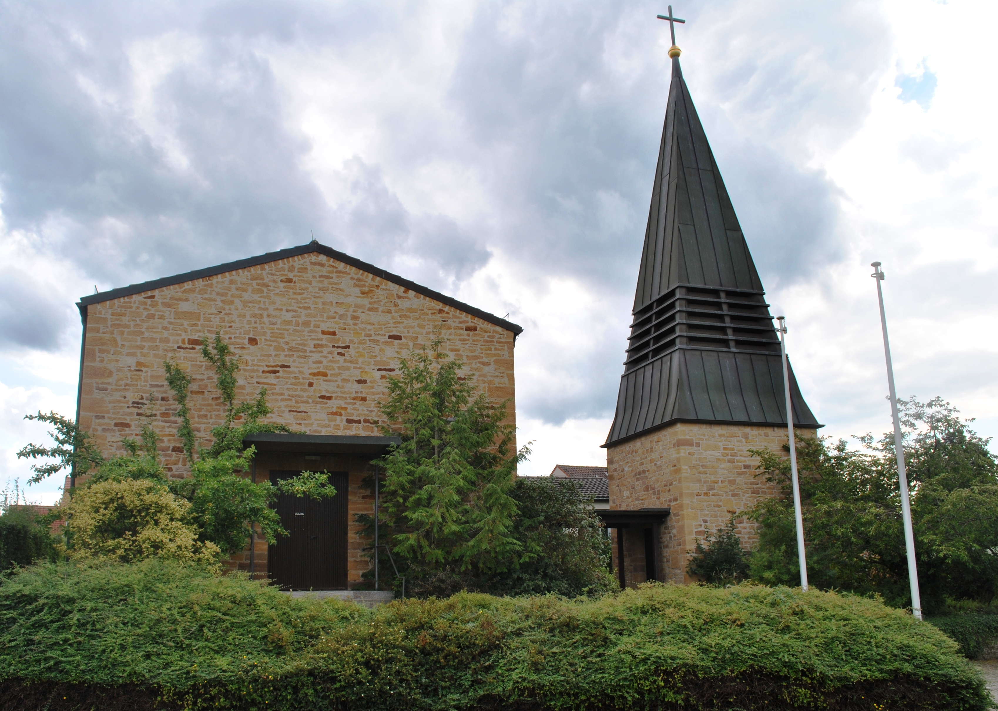 Evangelische Kirche (Rüdenhausen)